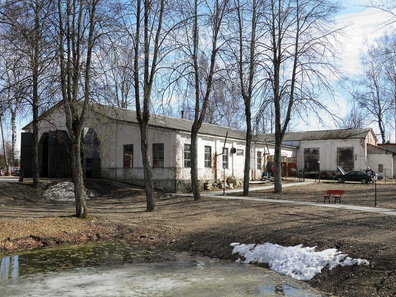 Здание ремонтного цеха паровозов